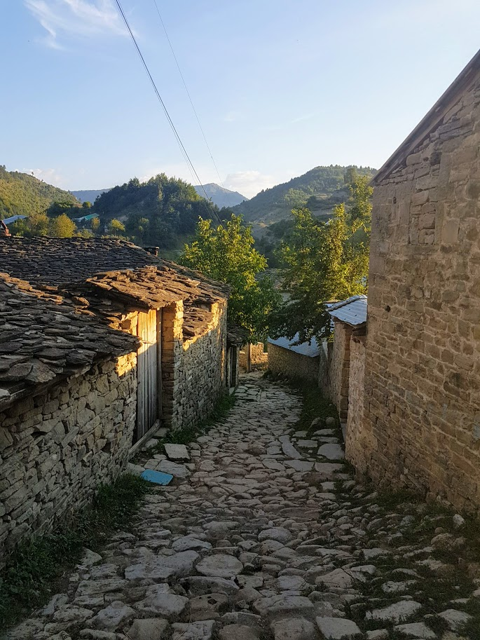 Sokak me kalldrëm dhe shtëpi në të dyja krahet.